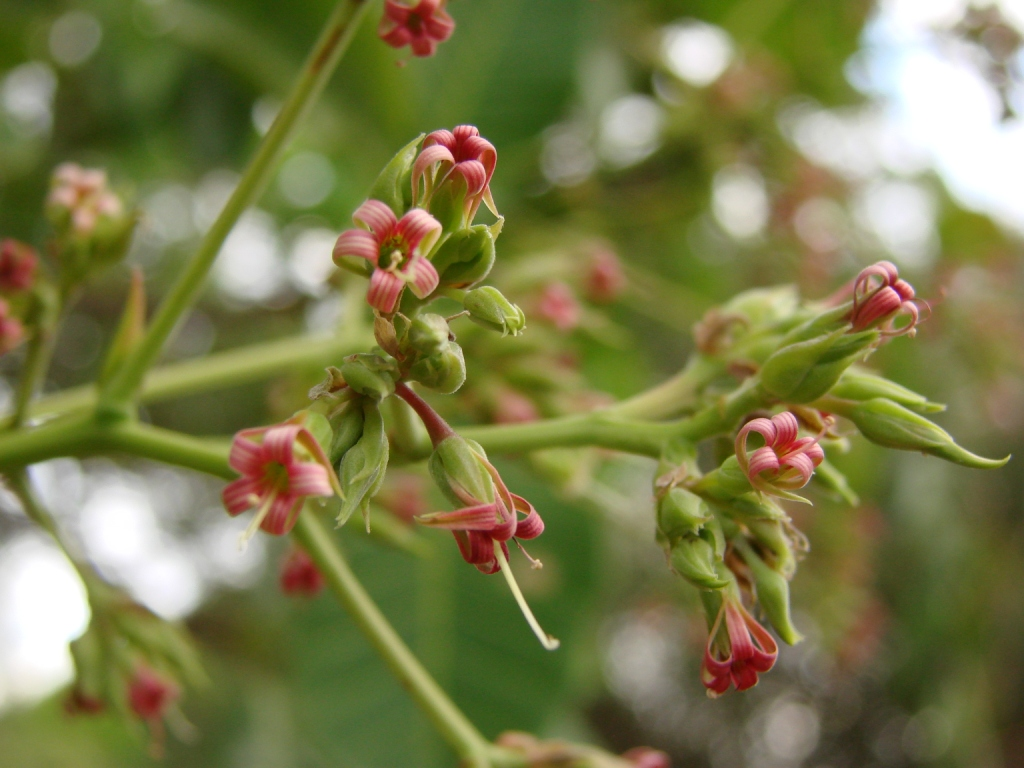 Anacardium occidentale - ANACARDIACEAE Fazenda Vaga-Fogo - Pirenópolis, Goiás - Brasil.